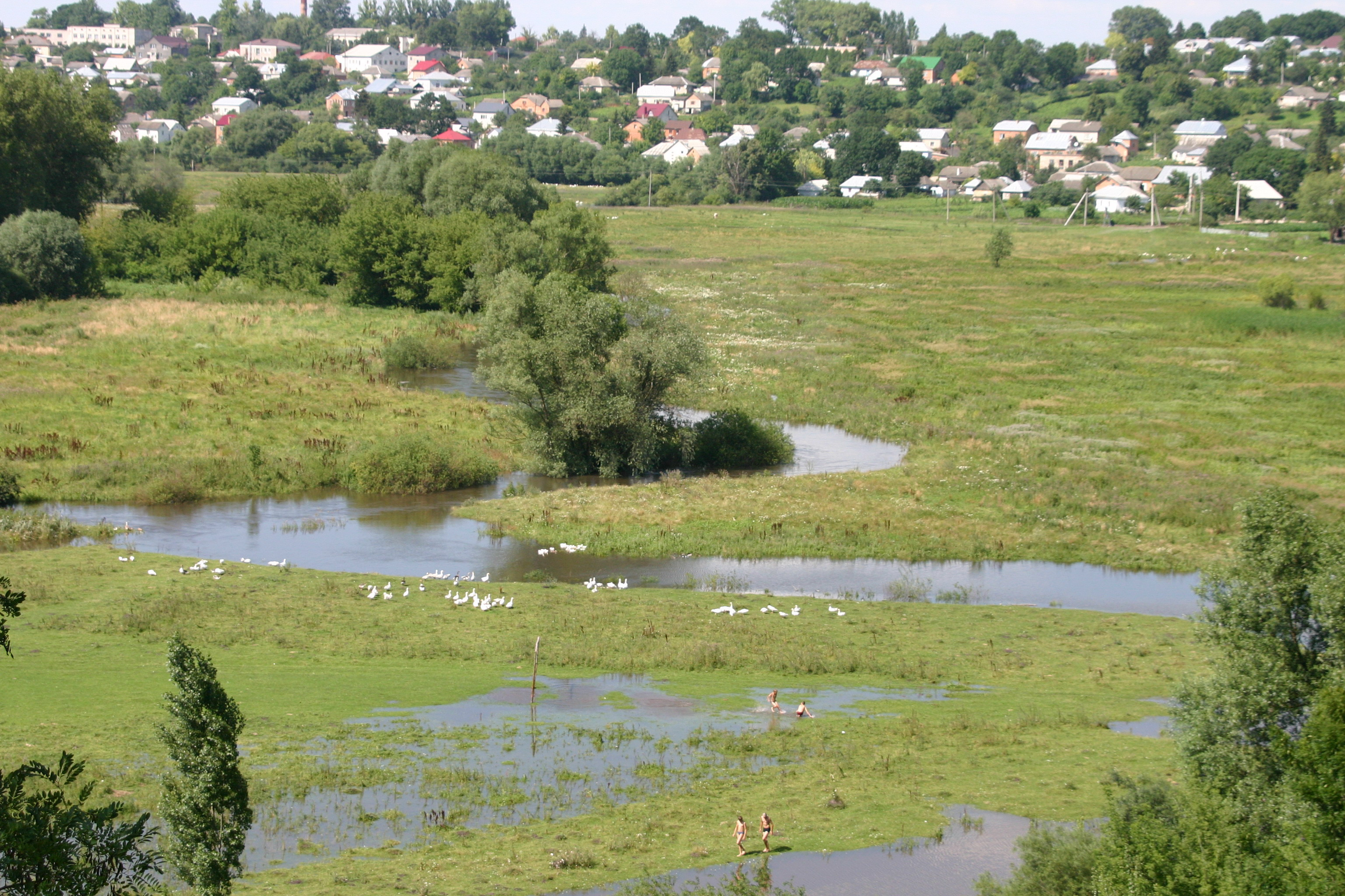 Річка Гнізна Гнила. Літо на берегах Гнізни.